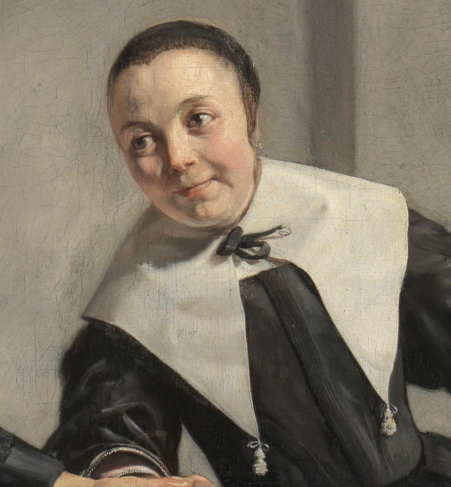 Portretten van de doopsgezinde Haarlemse drukker Abraham Casteleyn en zijn echtgenote Margarieta van Bancken. Ten voeten uit, zittend op een terras. Links een deel van een studeervertrek met boeken, een grote globe en een portretbuste van Laurens Jansz. Coster.; Jan de Bray (ca. 1627–1697), olieverf op doek, 1663